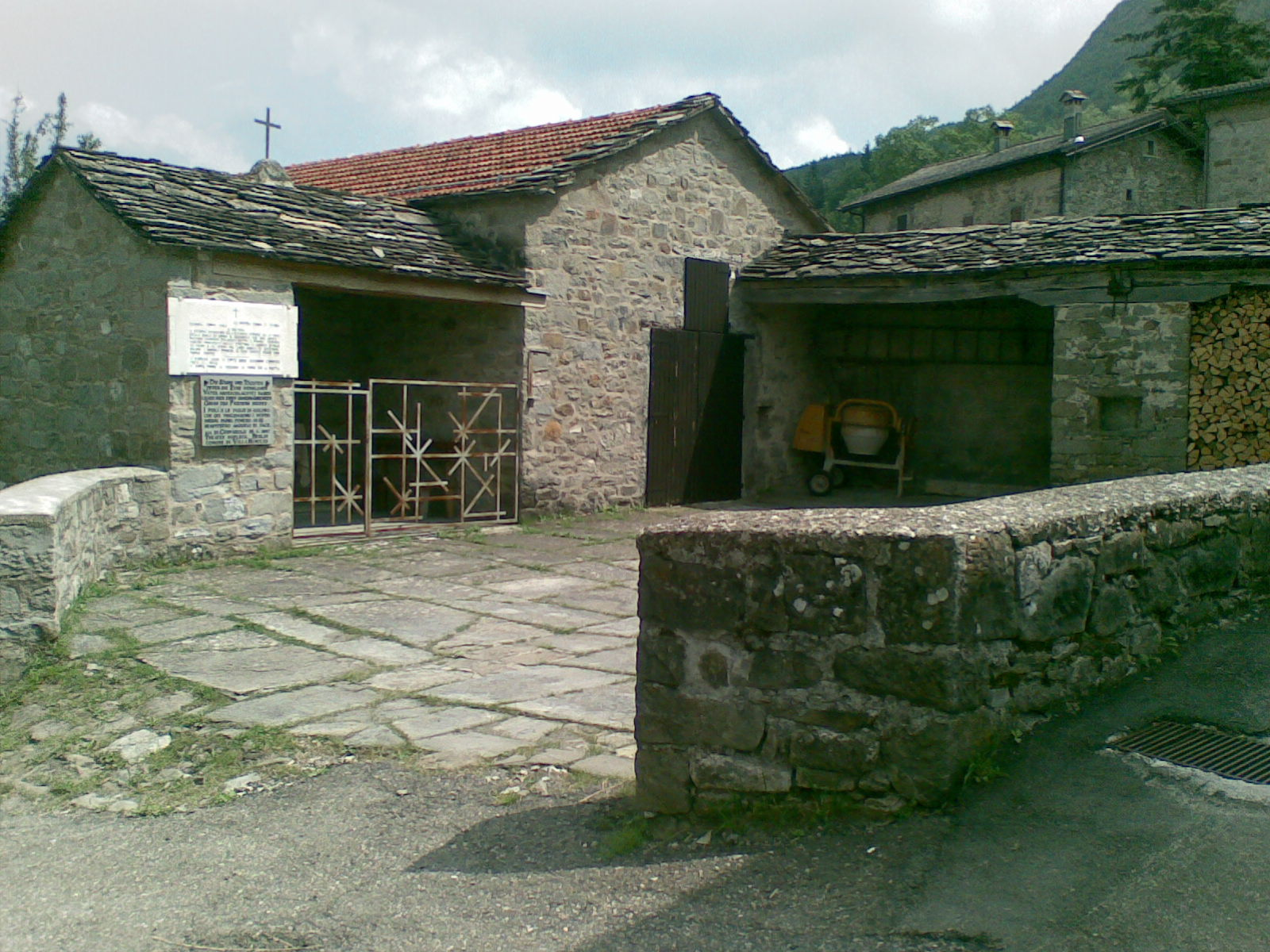 L'aia di Cervarolo (Villa Minozzo, RE) nella quale il 20 marzo 1944 vennero trucidati 24 inermi abitanti ad opera dei nazifascisti.